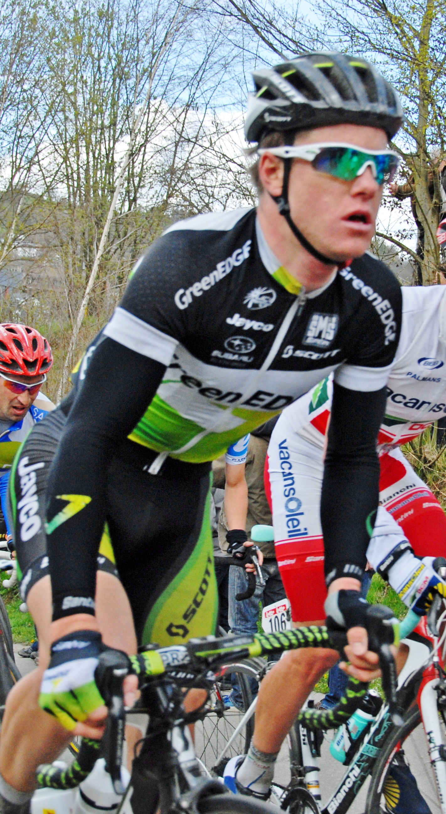 Côte de Stockeu in Luik-Bastenaken-Luik 2012